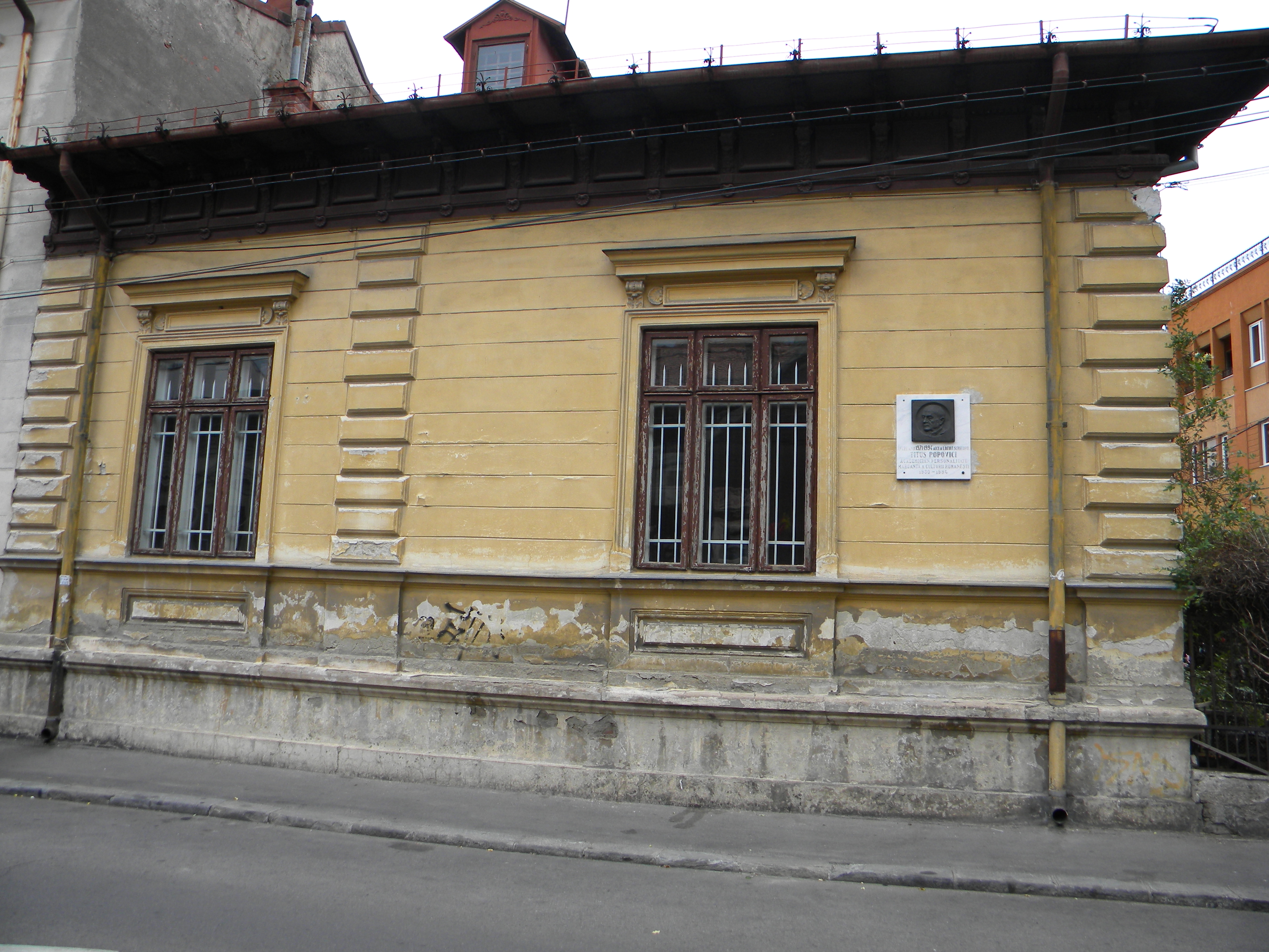 Bucuresti, Romania, Casa pe Str. Vasile Alecsandri nr. 13 (a locuit Titus Popovici); B-II-m-B-17946